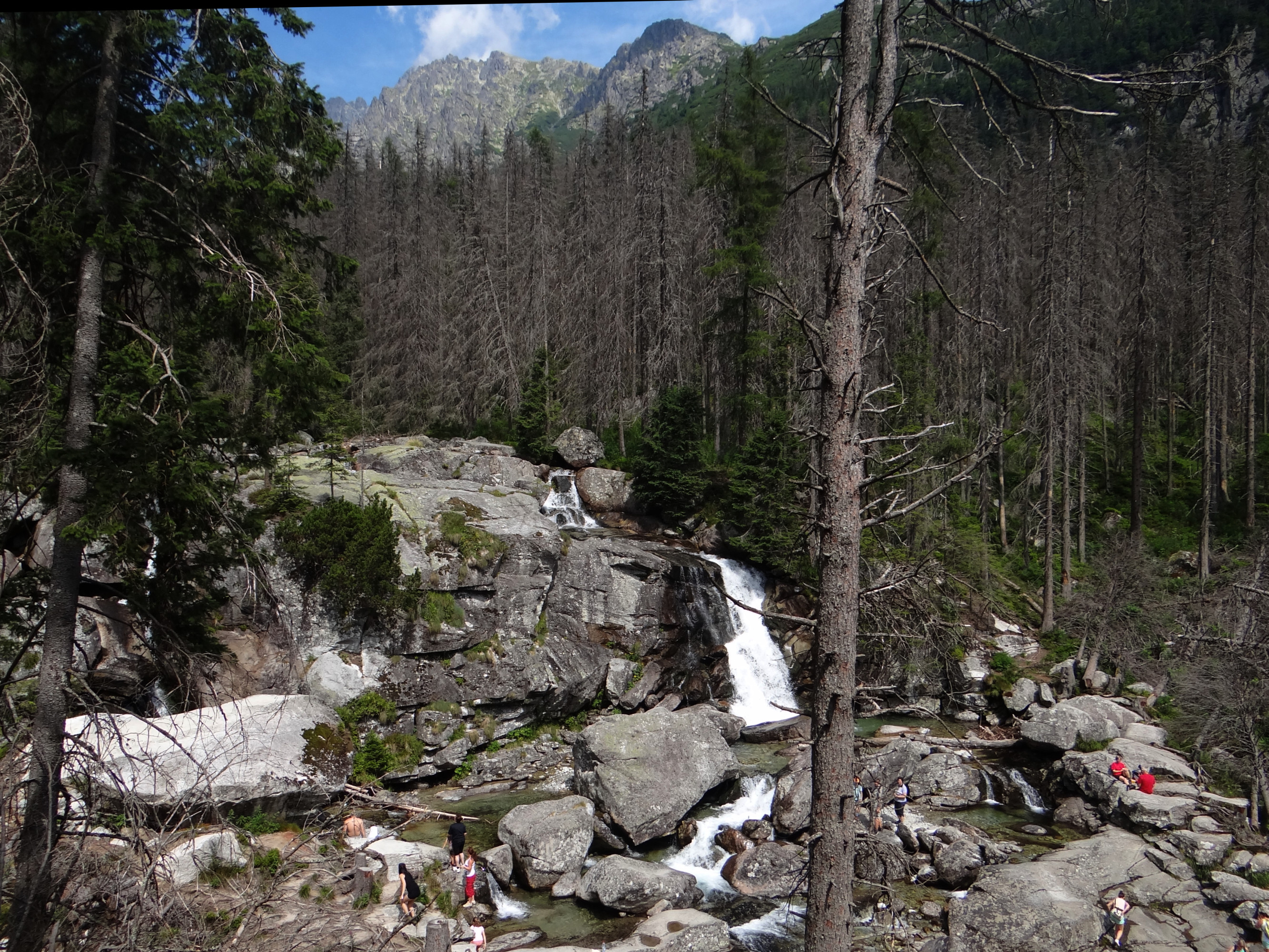 Veľký vodopád. WQielki Wodospad w Dolinie Zimnej Wody